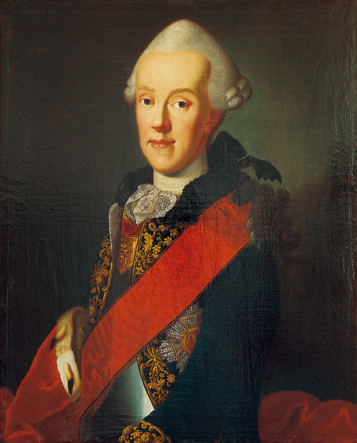 Frederick Charles, Prince of Schwarzburg-Rudolstadt (1736-1793)label QS:Len,"Frederick Charles, Prince of Schwarzburg-Rudolstadt (1736-1793)" label QS:Lde,"Friedrich Karl, Fürst von Schwarzburg-Rudolstadt (1736-1793)"